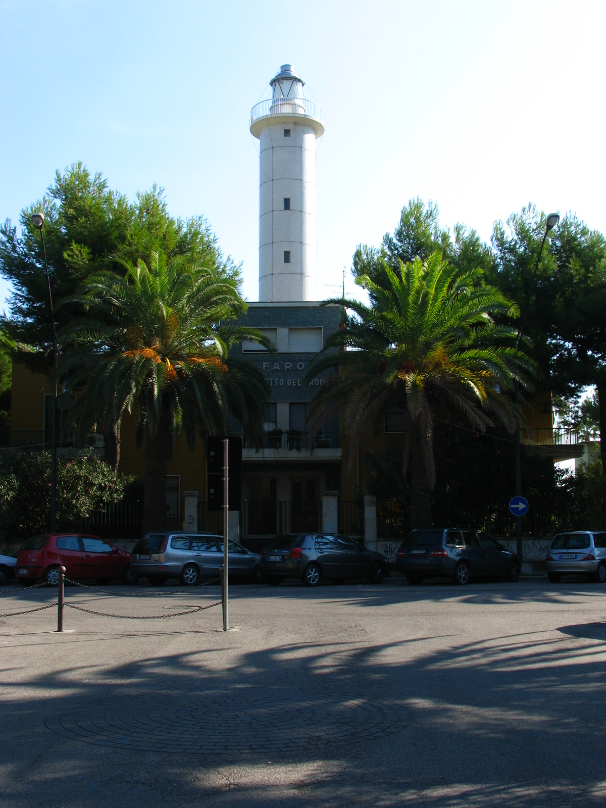 Il faro.